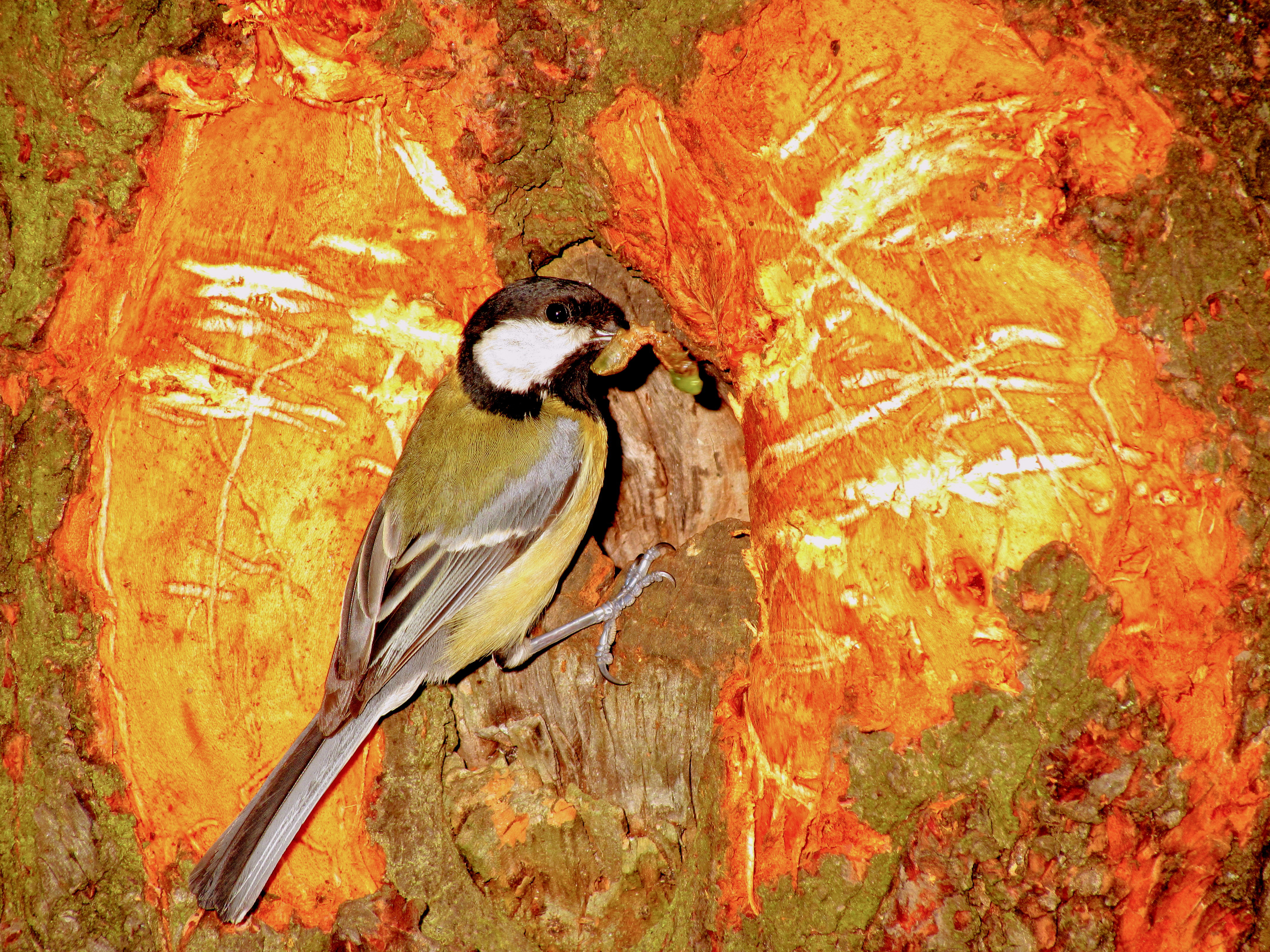 Meise an einer Bruthoehle 13-05-2011